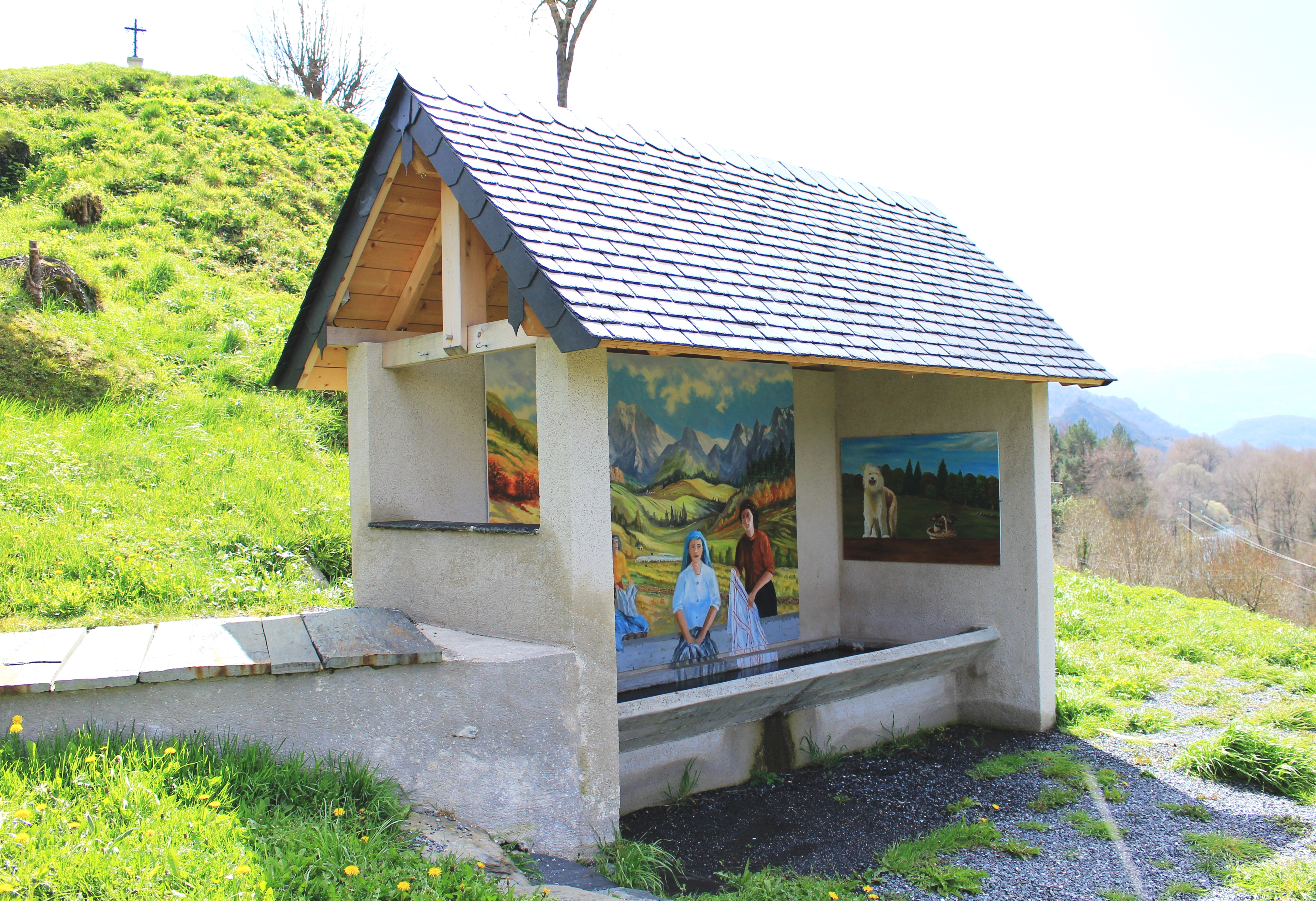 Lavoir de Lugagnan (Hautes-Pyrénées)